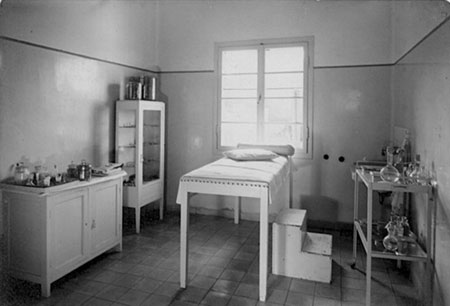 צילום של מרפאה טיפוסית, שנת 1930